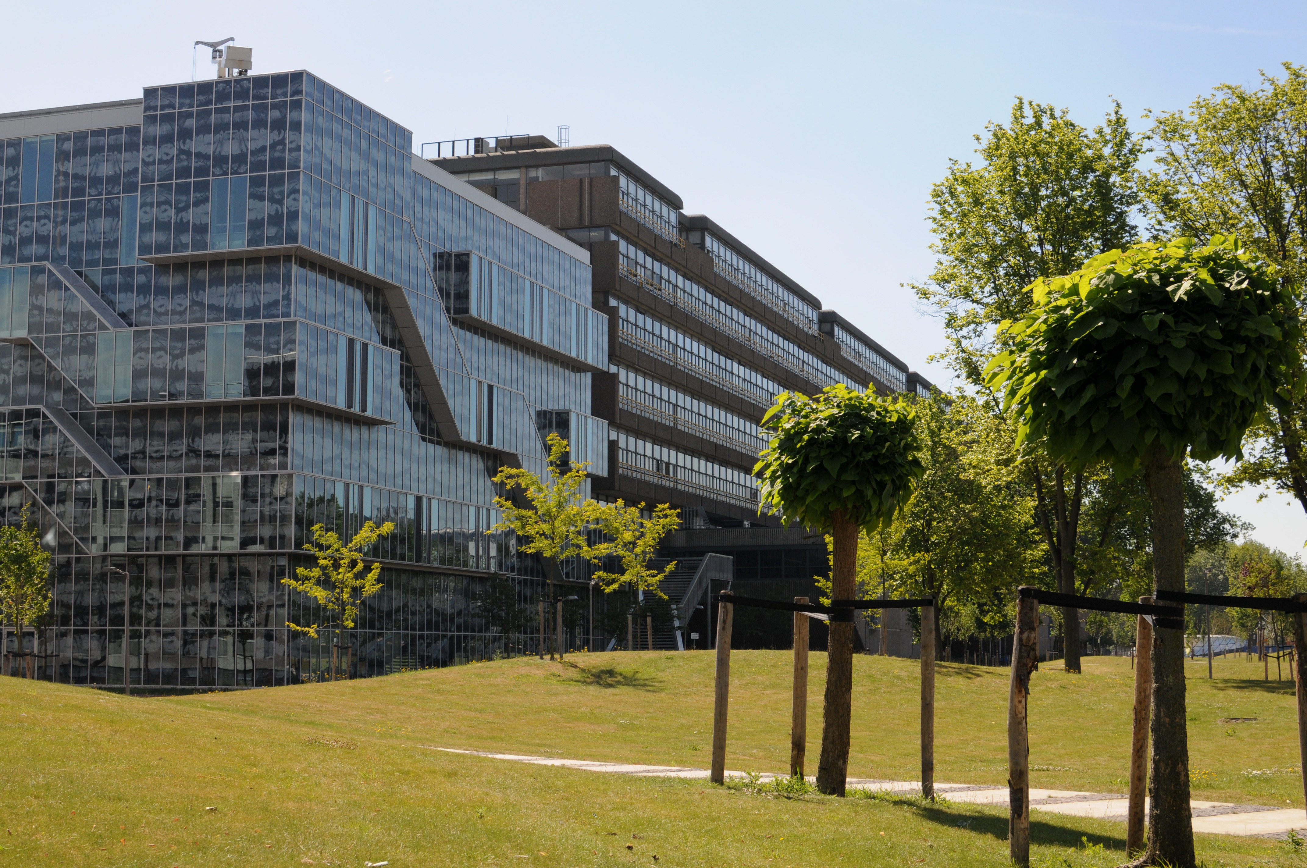 TU Delft Geoscience department